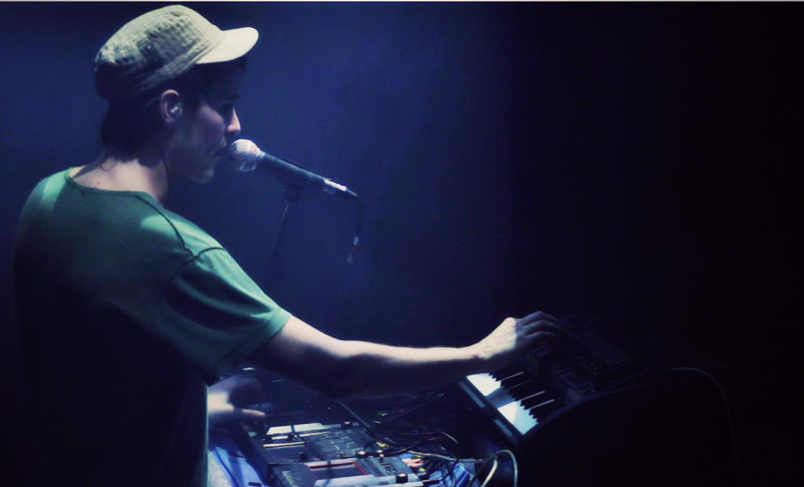 Beatmac tocando en la sala Niceto Club de Buenos Aires.